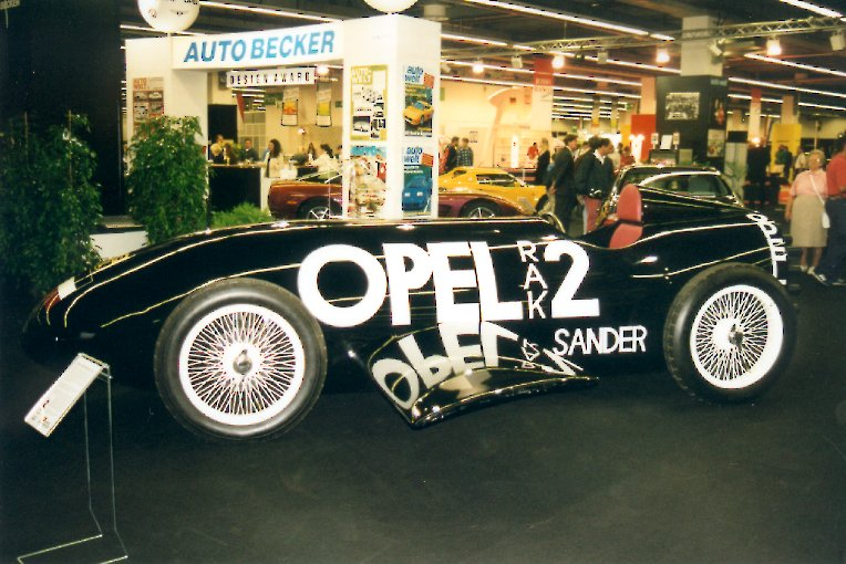 Opel RAK.2